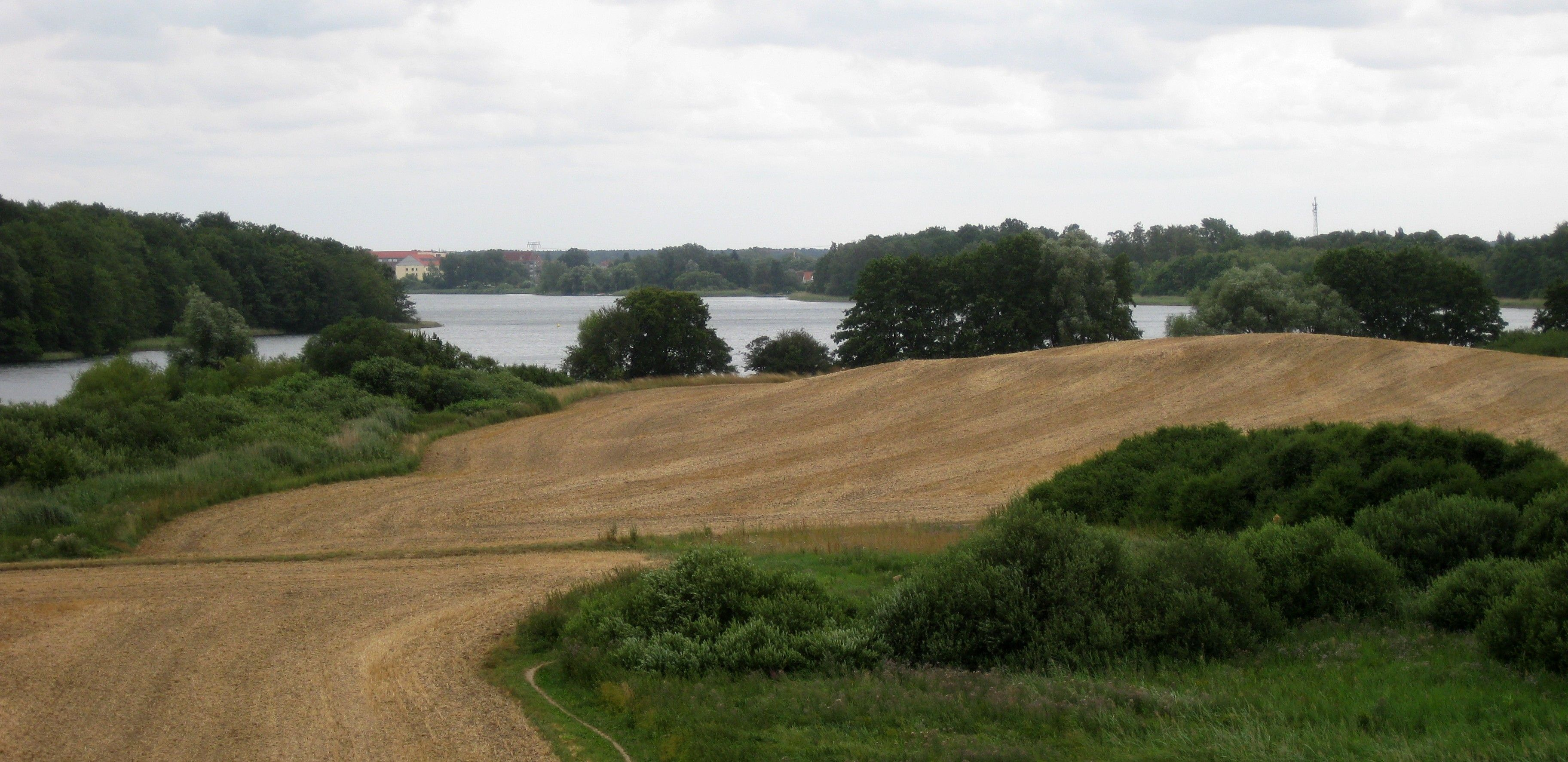 Panoramablick über die Moränenlandschaft am Tiefwarensee.